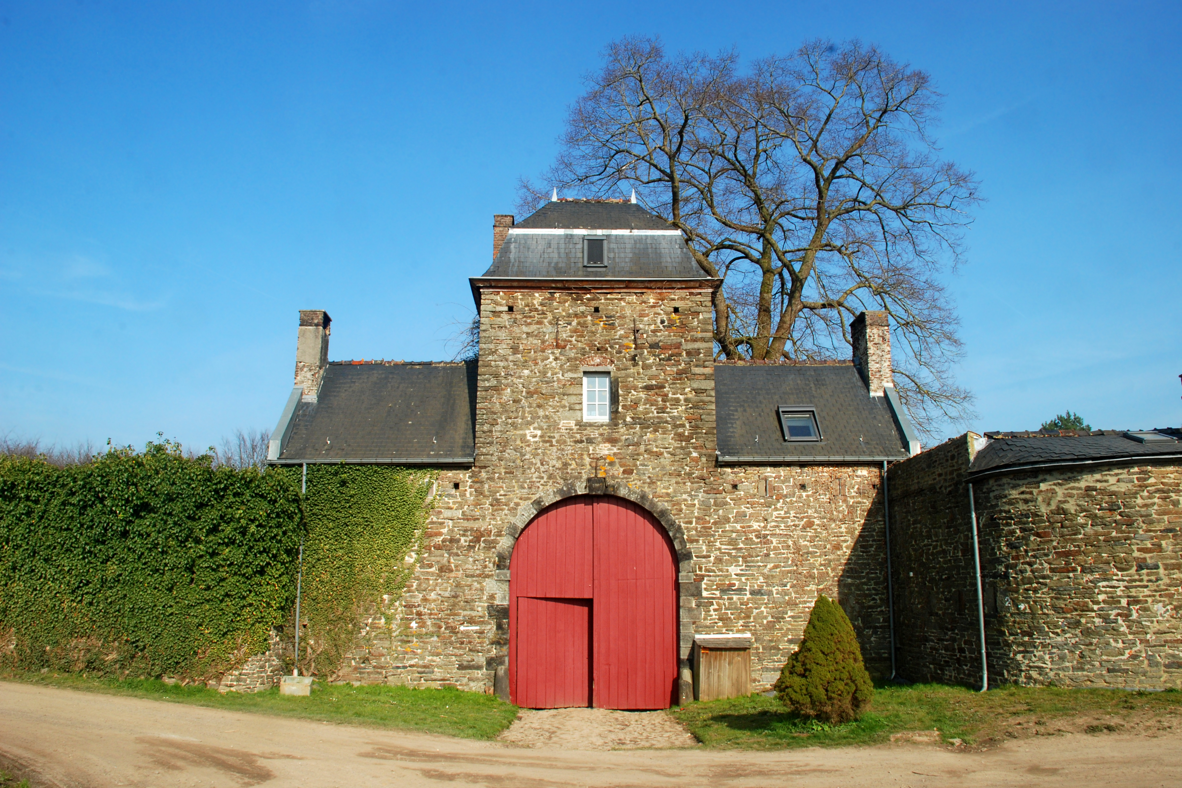 Belgique - Brabant wallon - Villers-la-Ville - Porte de Nivelles